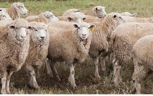 Ejemplares de La Comarqueña en el campo